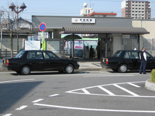 平田町駅 2008年3月撮影